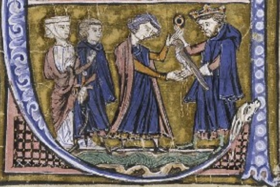 Coloman et Godefroy de Bouillon